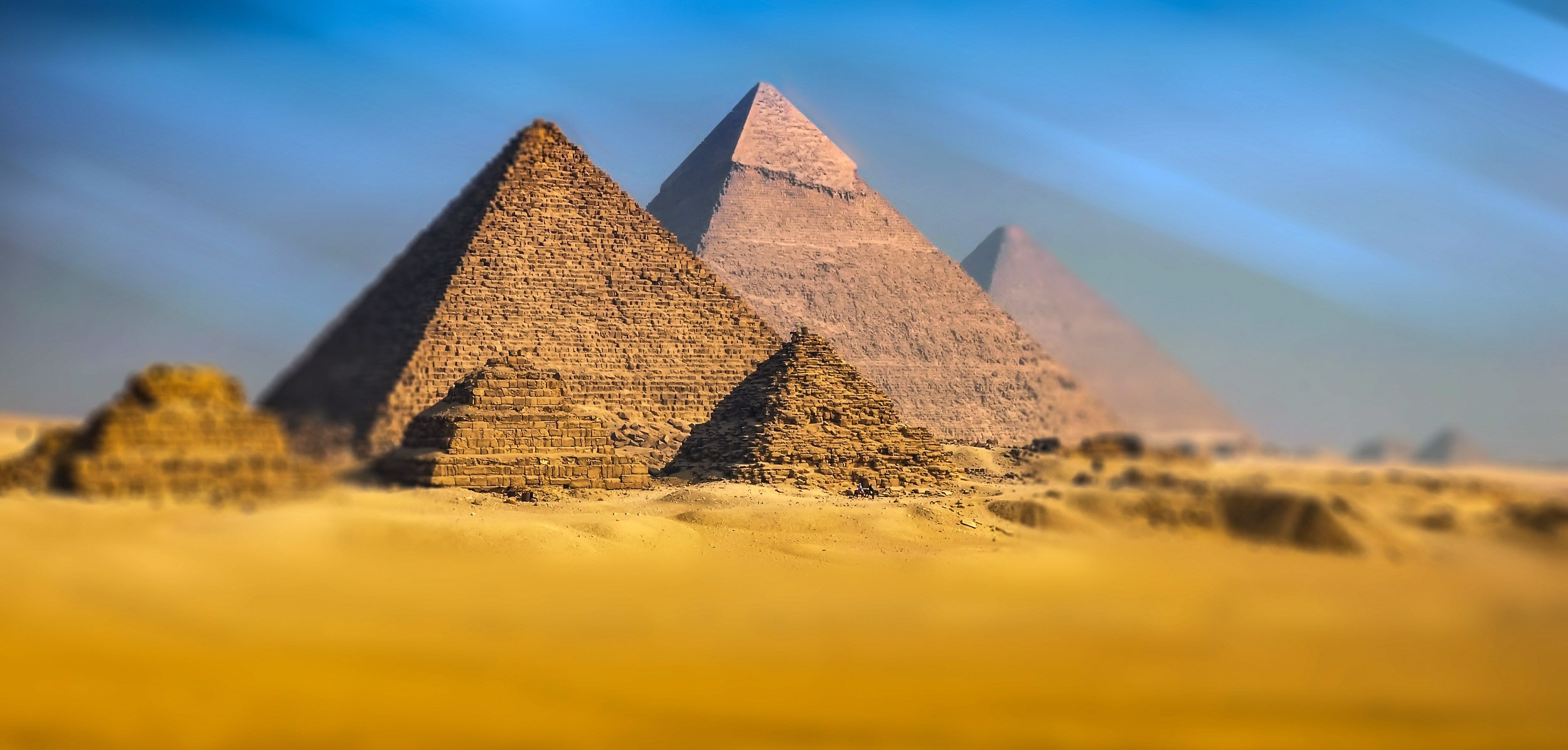 Vista panorámica de las pirámides de Guiza